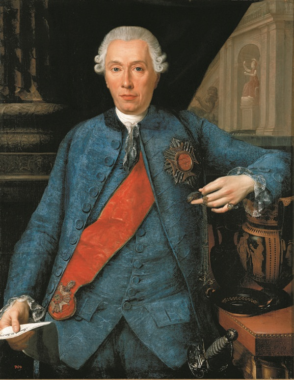 Porträt des Fürsten Ludwig Carl Otto zu Salm-Salm